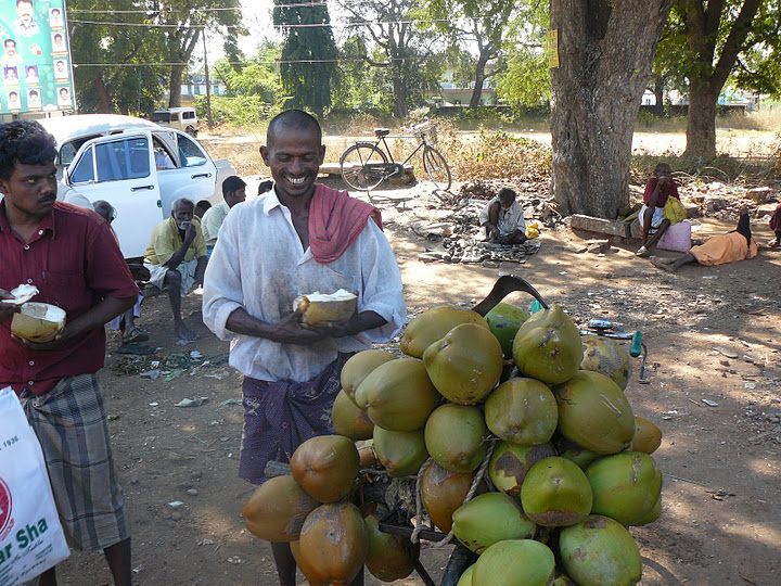 கிராமத்து இளநீர்க் கடை